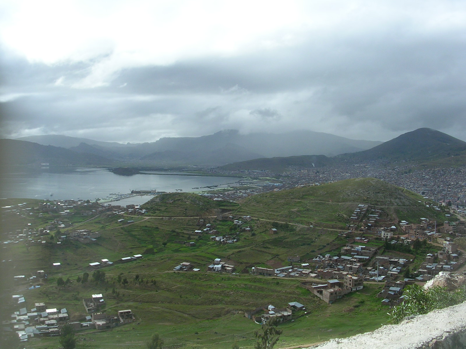 Puno desde el mirador PumaUta